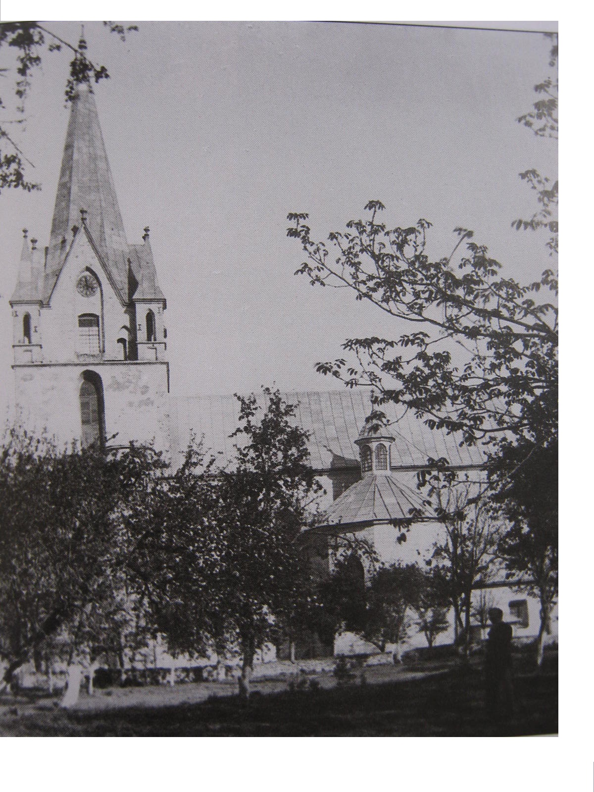 Костел (мурований) у смт Золотий Потік Бучацького району Тернопільської області (старе фото).